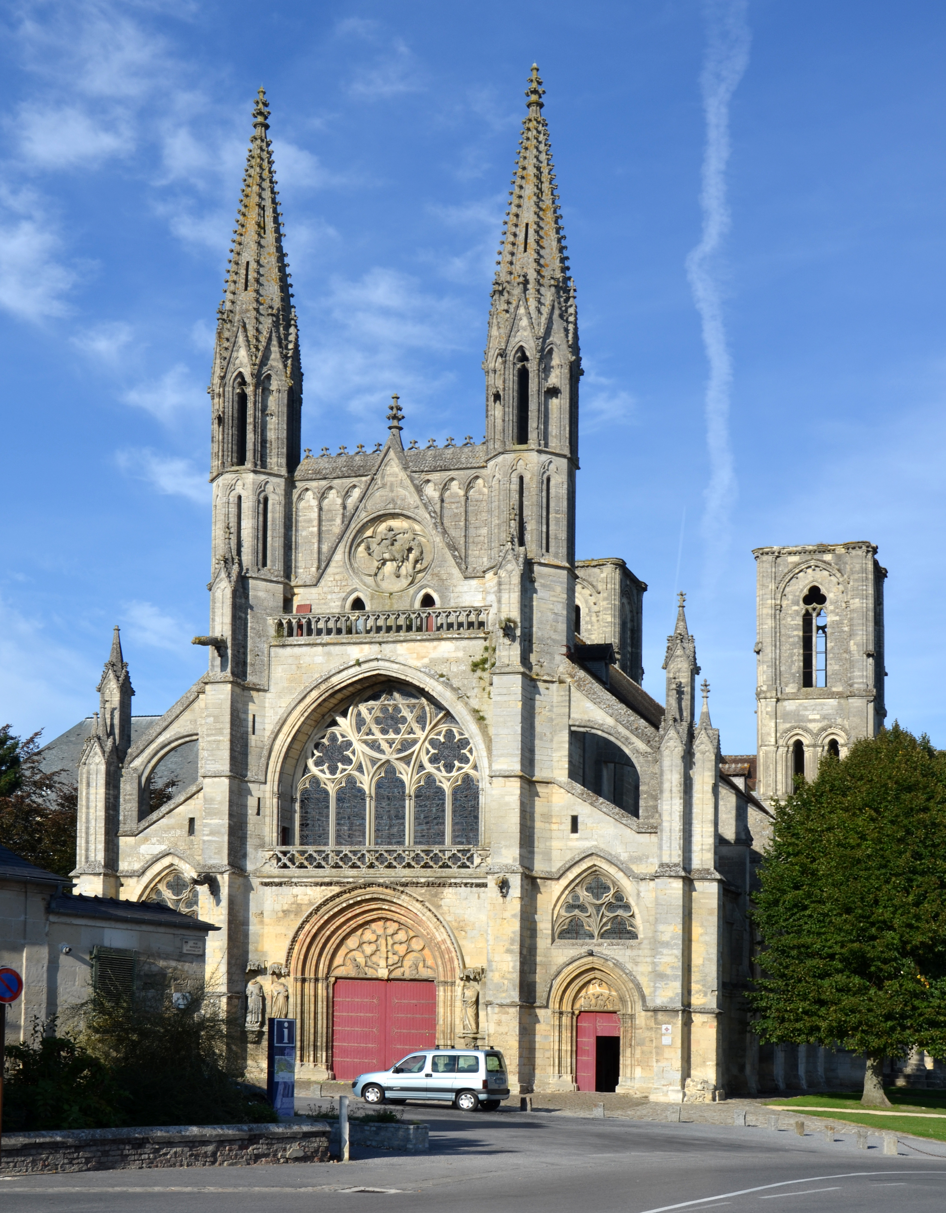 Église Saint-Martin, Laon, Aisne, France .